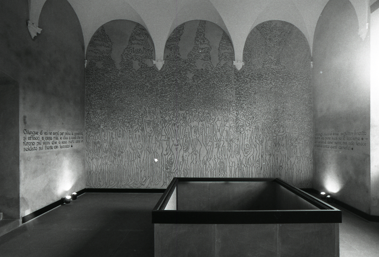 Servizio fotografico : Carpi, 1973 / Paolo Monti. - Strisce: 7, Fotogrammi complessivi: 36 : Negativo b/n, gelatina bromuro d'argento/ pellicola ; 35 mm. - ((Sul portanegativi: N[I]K[MA]T FP4 e iscrizione inventariale manoscritta a pennarello verde "2441". - Il museo è stato inaugurato il mese di ottobre del 1973. - Occasione: Documentazione del nuovo Museo progettato dallo studio BBPR. - Fonte: Agenda di Paolo Monti: Leica 1501-3000 Controllo numerazione (1950-1978), presso Archivio Paolo Monti. - Fonte: Monografia di Orlandi, Piero: Museo monumento al deportato politico e razziale nei campi di sterminio nazisti: Carpi, Castello dei Pio, Sesto San Giovanni, G. Beveresco (1973). - Fonte: Fattura di Paolo Monti: IV. Commesse/ Fattura (1972/11/14), presso Archivio Paolo Monti